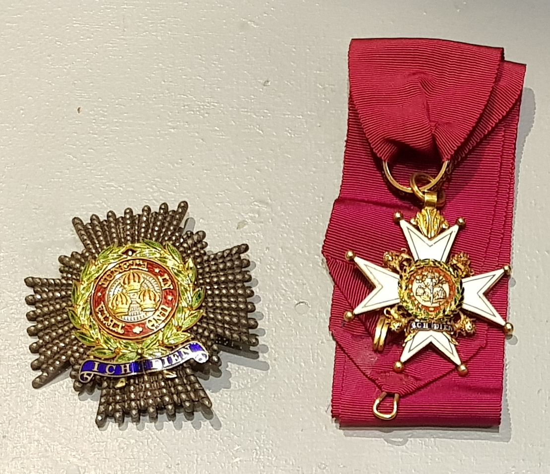 Brytyjski wojskowy Order Łaźni II kl. nadany gen. Stanisławowi Ujejskiemu – zbiory w kolekcji Muzeum Wojska Polskiego w Warszawie